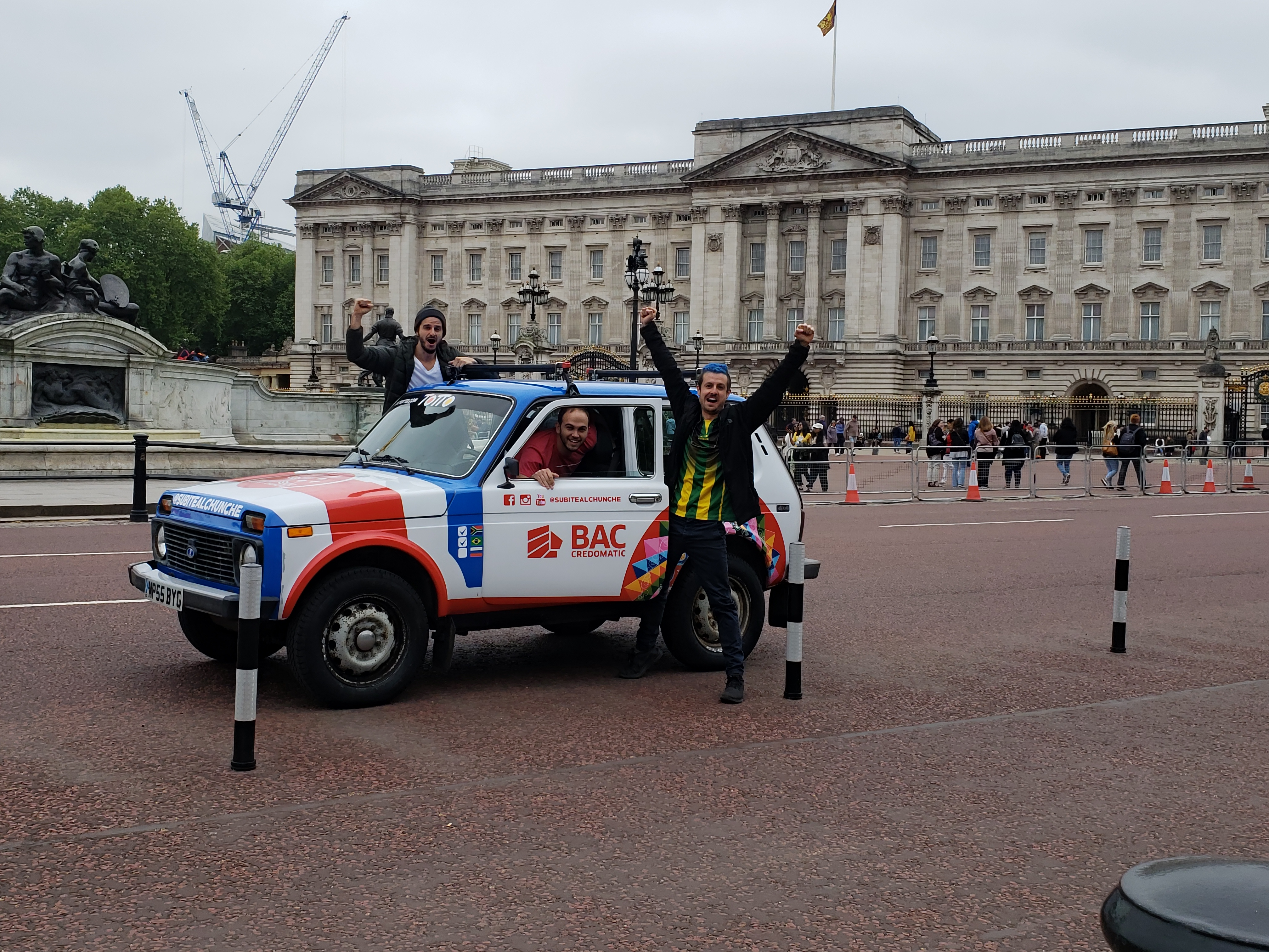 Los integrantes del proyecto Subite al Chunche fuera de Buckingham Palace, con su vehículo insignia, un Lada Niva 1980.